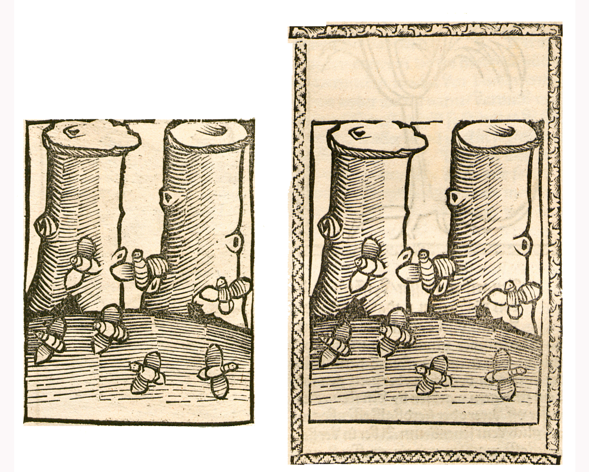 Abbildung vonː Tröster, Bienen- (Bienenwaben)